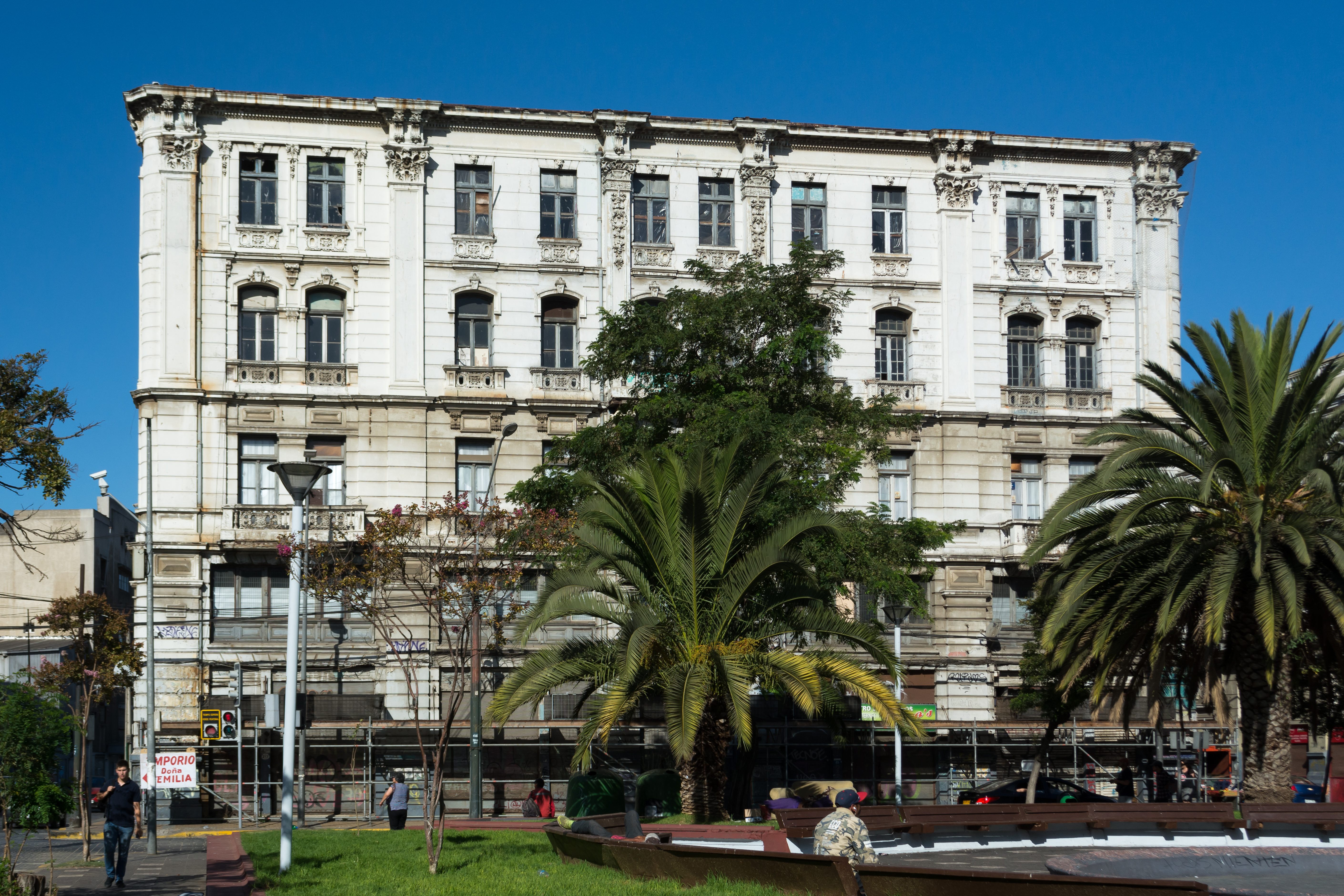 Edificio Astoreca, Valparaíso, Región de Valparaíso, Chile